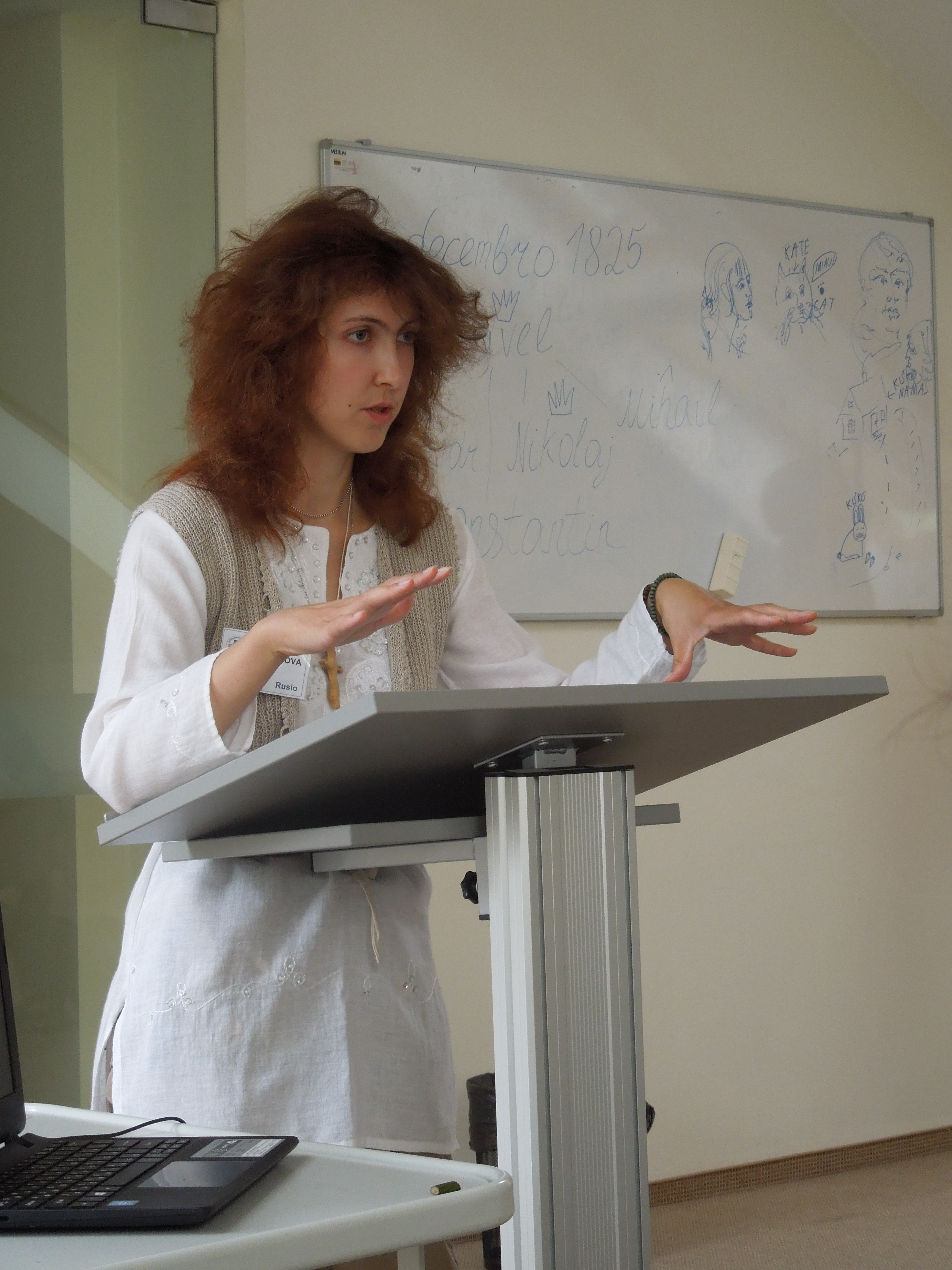 Anna Striganova dum BET-52